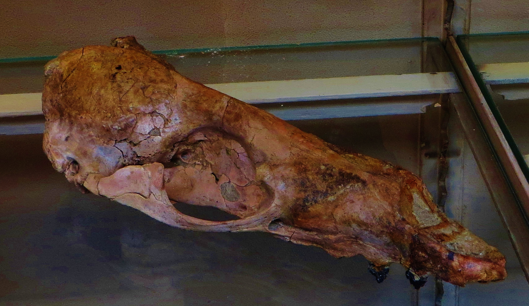 Fossil of Acrophoca , an extinct mammal - Took the photo at Museum Histoire Naturelle, Paris